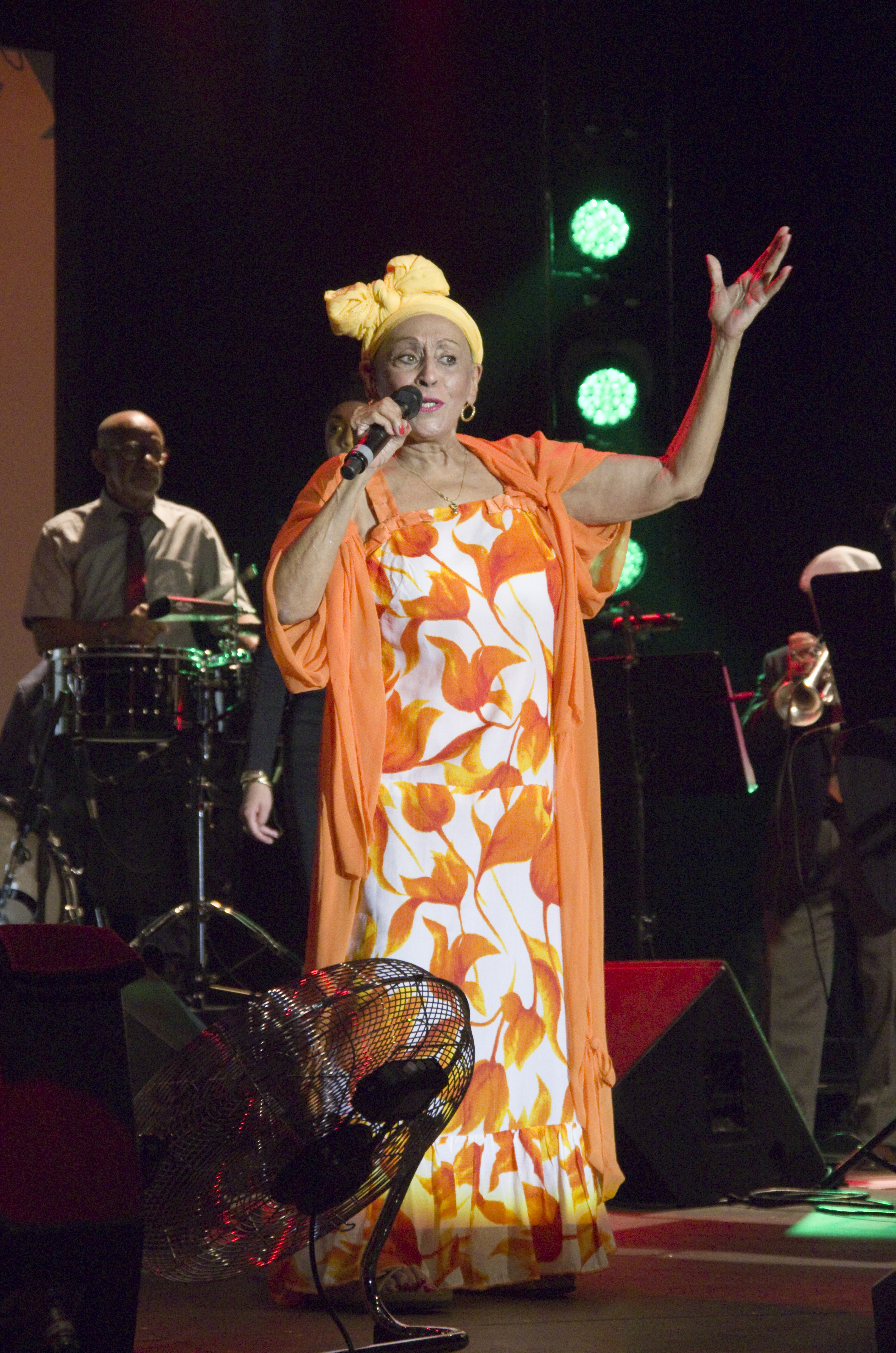 Das Zelt-Musik-Festival 2015 in Freiburg im Breisgau. 06.07.2015 Orquesta Buena Vista Social Club Omara Portuondo